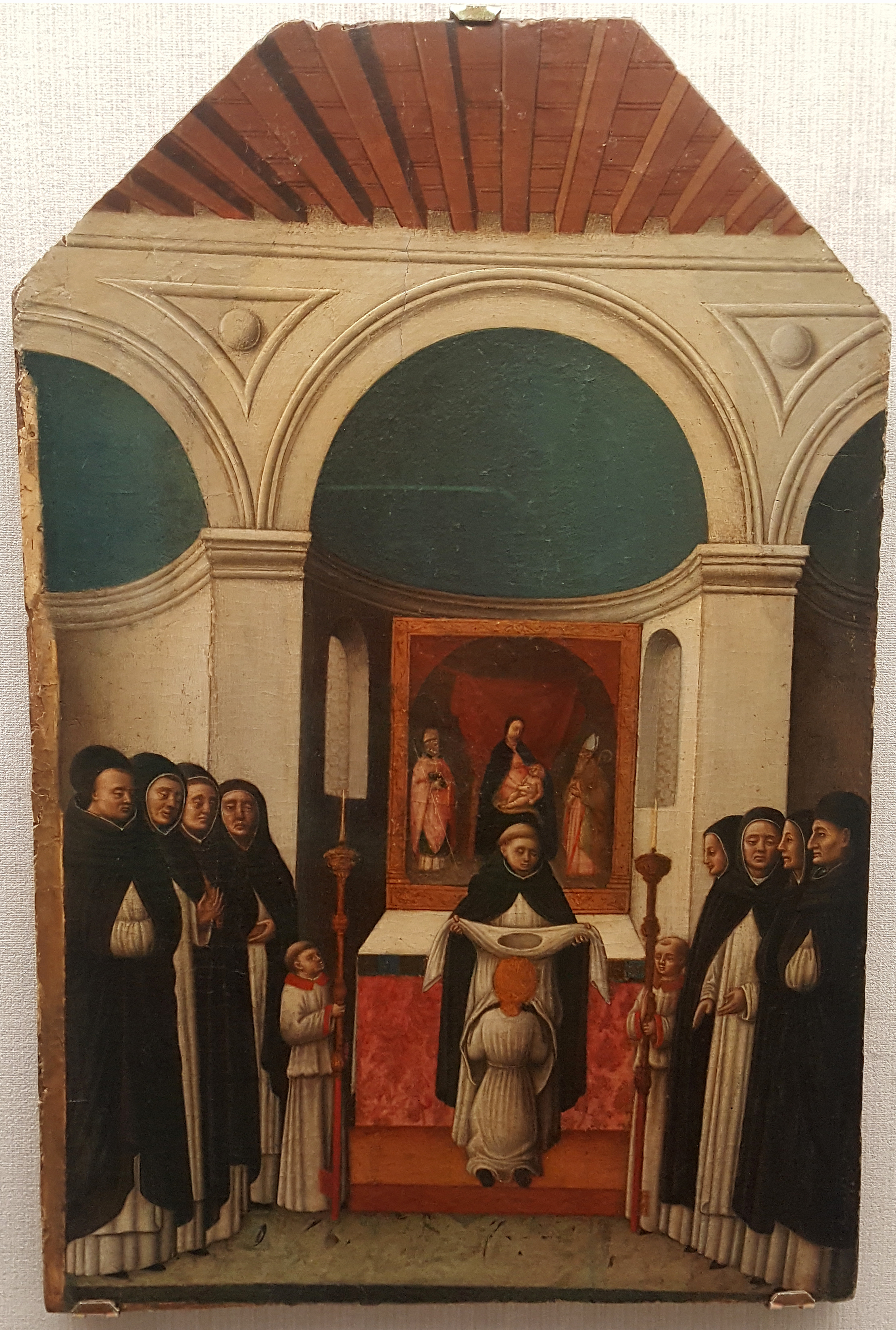 Altarbild von Antonio Vivarini in der Gemäldegalerie Berlin, es zeigt den Hl. Petrus Martyr beim Eintritt in den Dominikanerorden